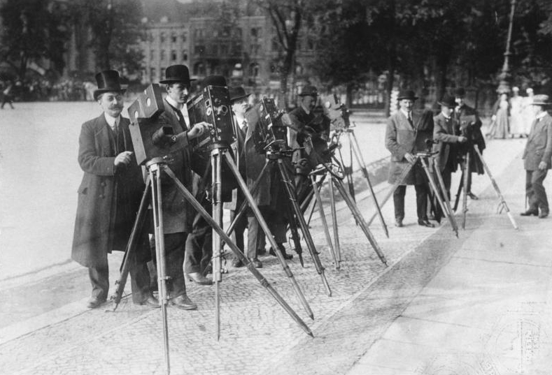 Kinooperateure vor dem Schlosse, die ihre Apparate vergebens nach dem Balkon des Schlosses gerichtet haben, auf dem sich das junge Paar nicht zeigte.